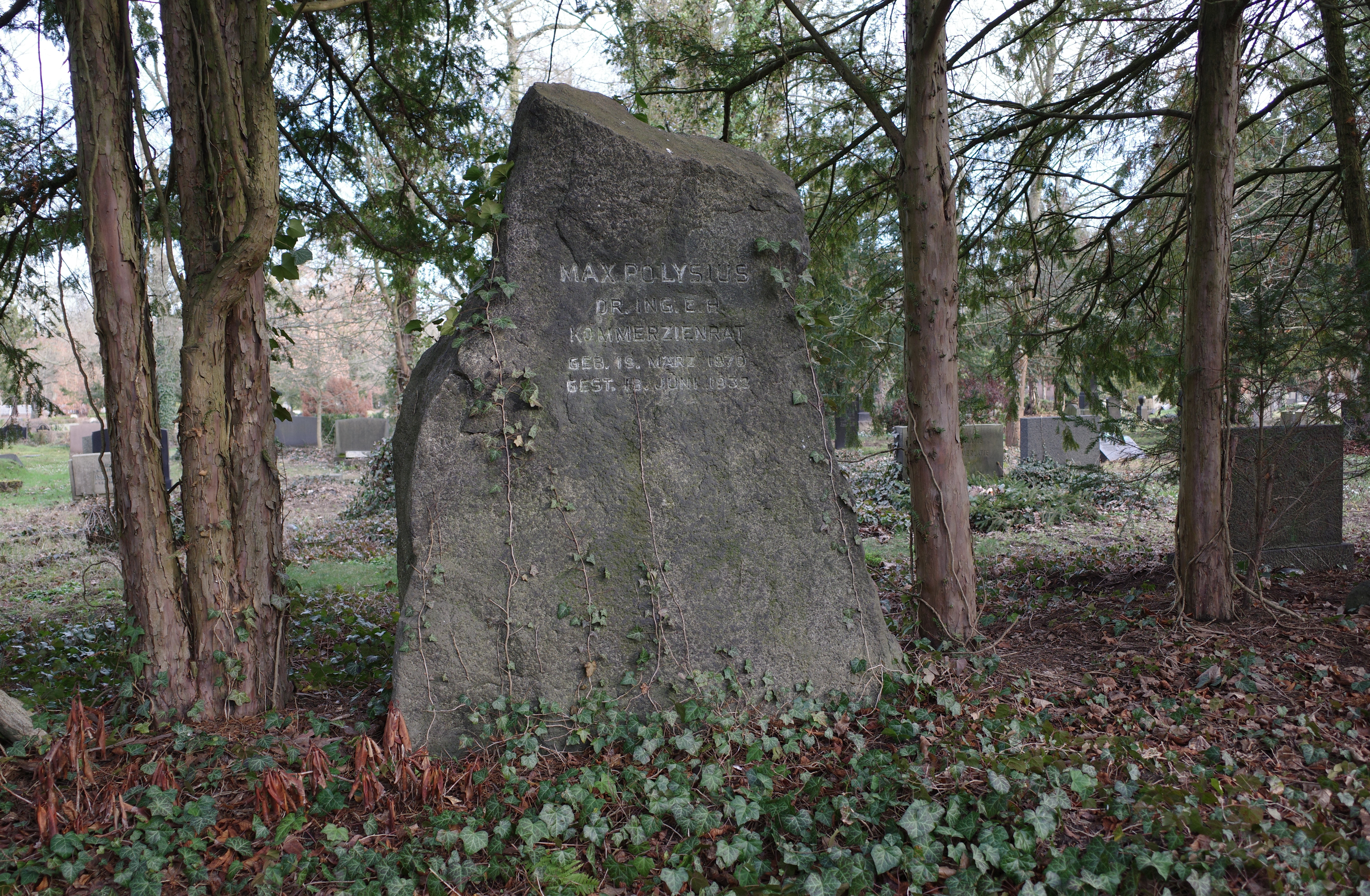 Dessau, Friedhof 3. Ruhestätte von Max Polysius.